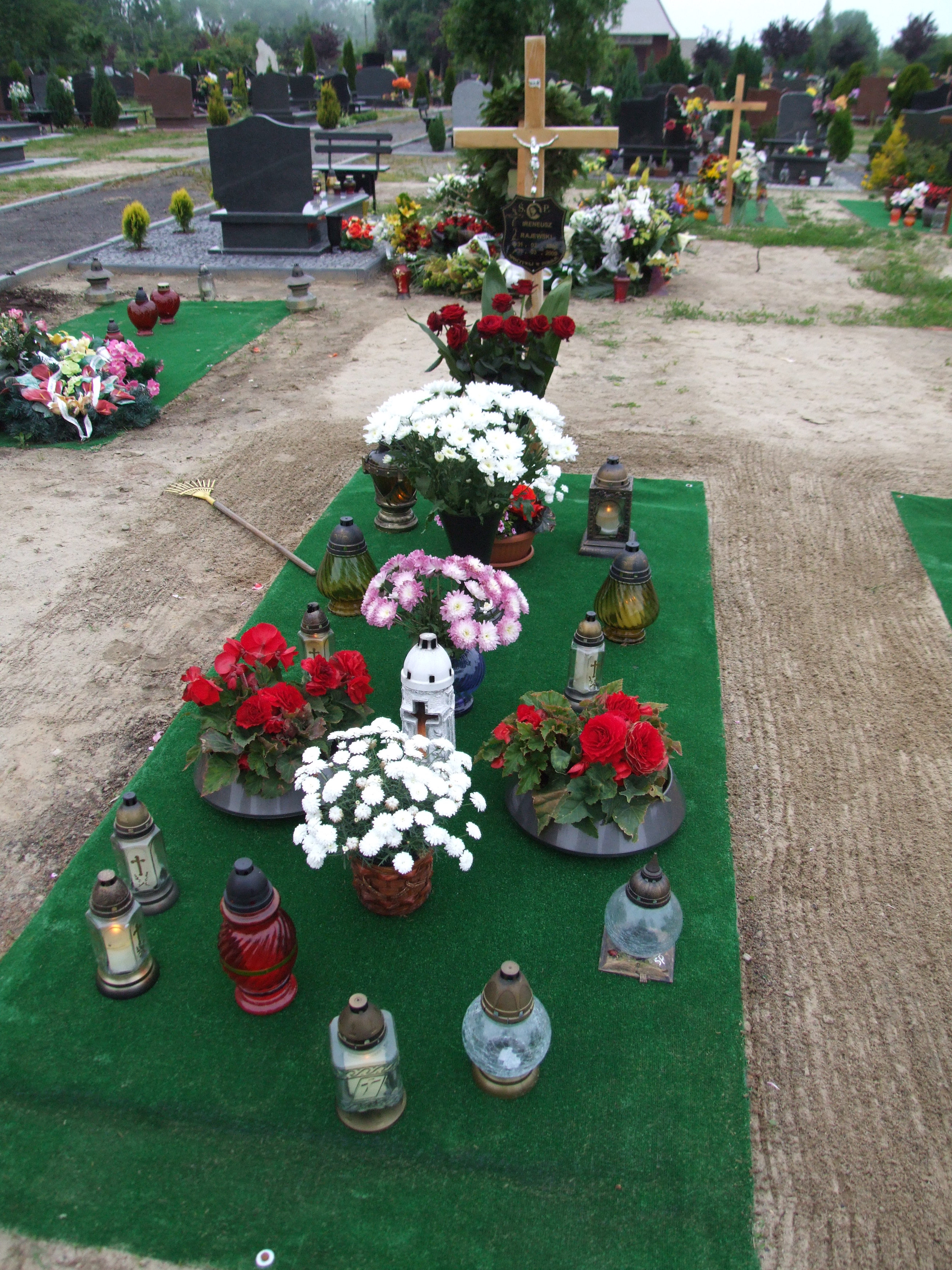 Gdynia-Oksywie Cmentarz Marynarki Wojennej